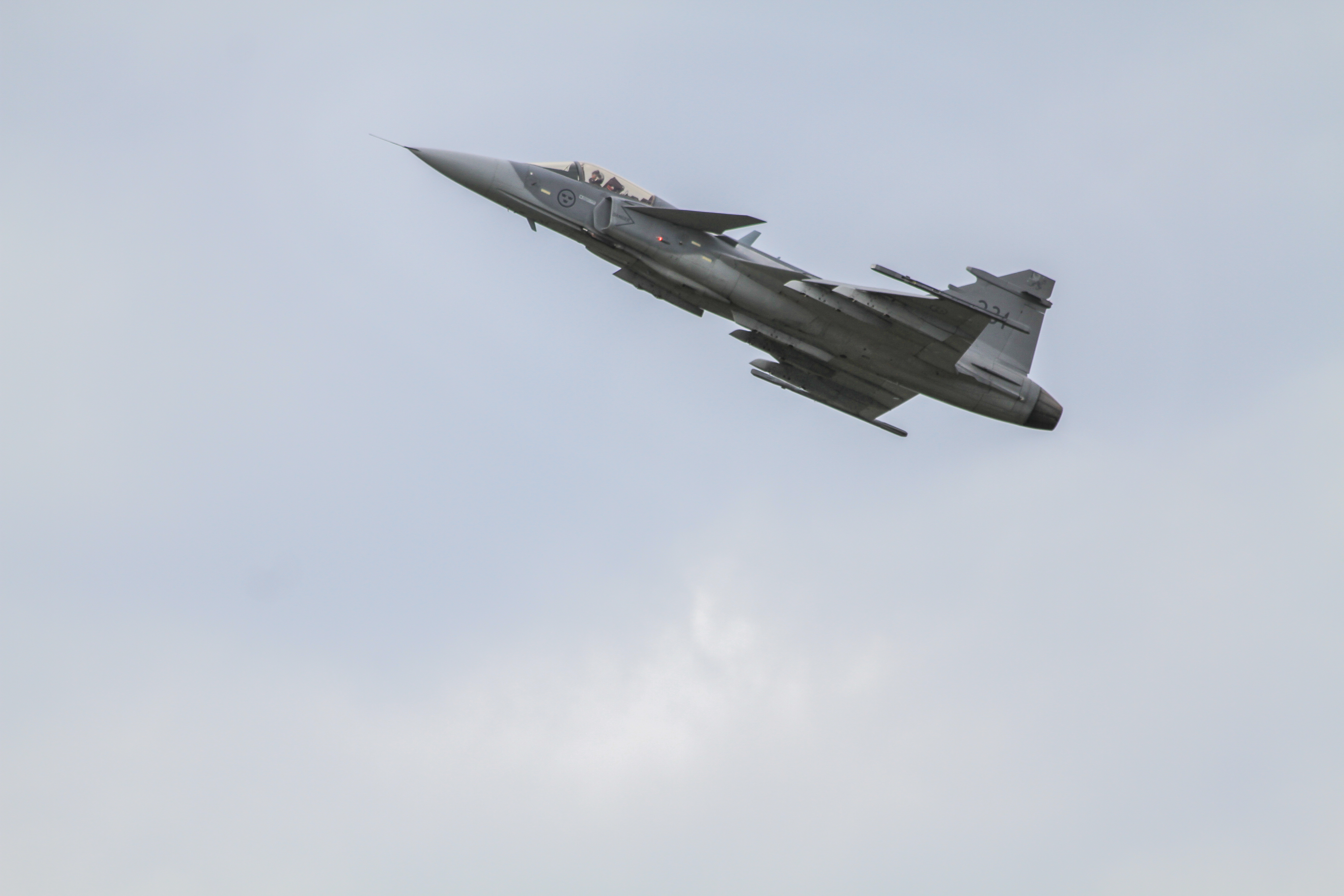 JAS-39 Gripen